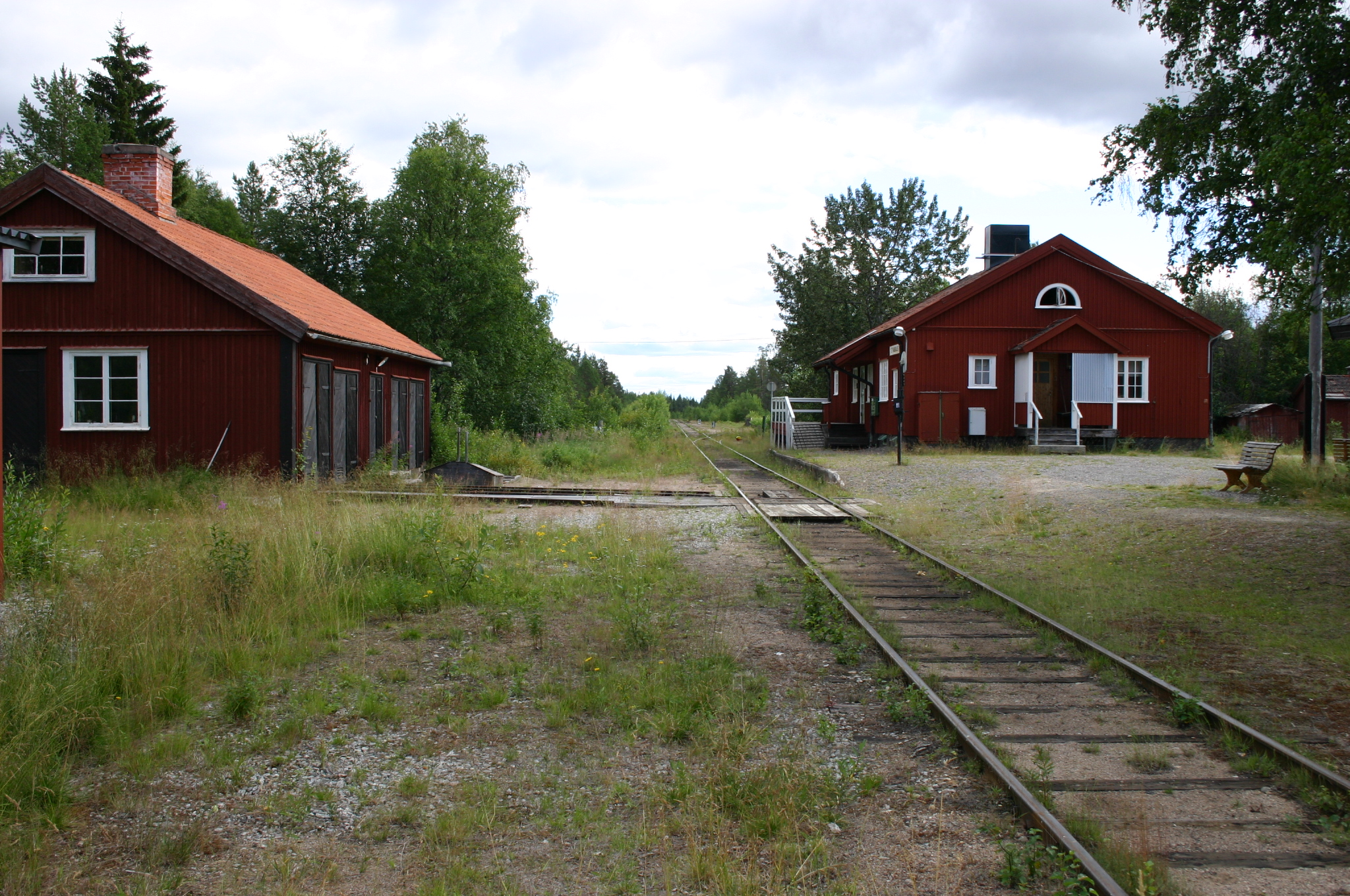 Bahnhof Kabdalis 11.08.04